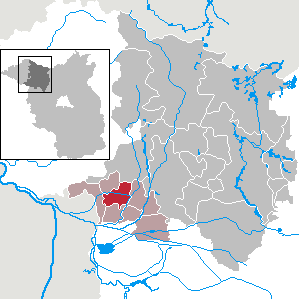 Zernitz-Lohm in Brandenburg (Country) - District Ostprignitz-Ruppin